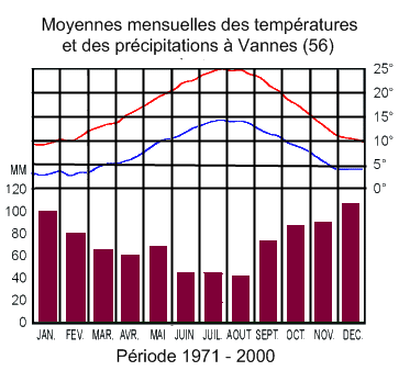 Données : températures et précipitations moyennes Vannes entre 1971 et 2000